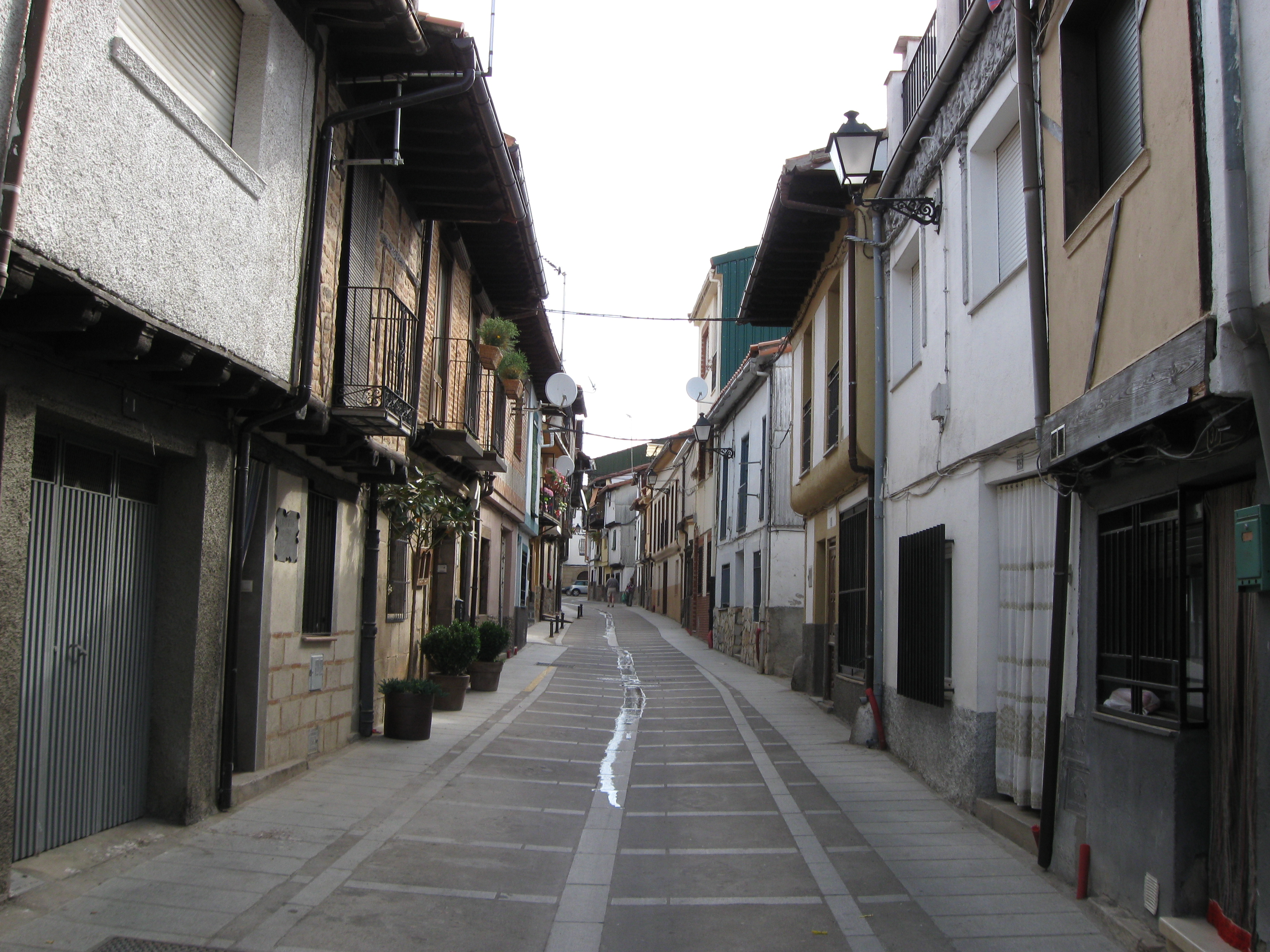 Calle Coronel Golfín. Jerte, provincia de Cáceres, España.